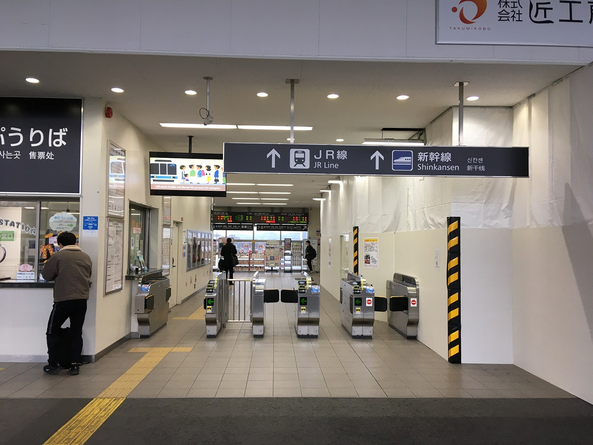 米原駅JR在来線改札口